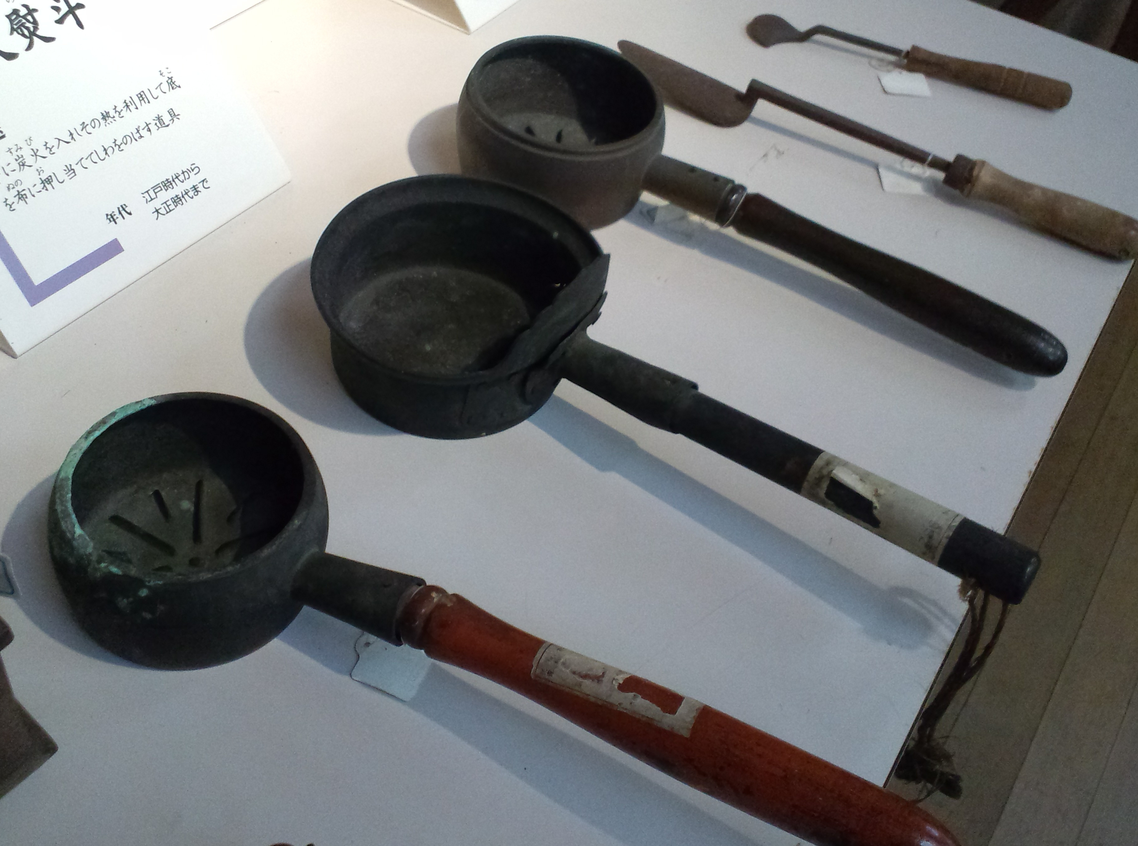 田原市民俗資料館 火熨斗（江戸時代から大正時代まで）